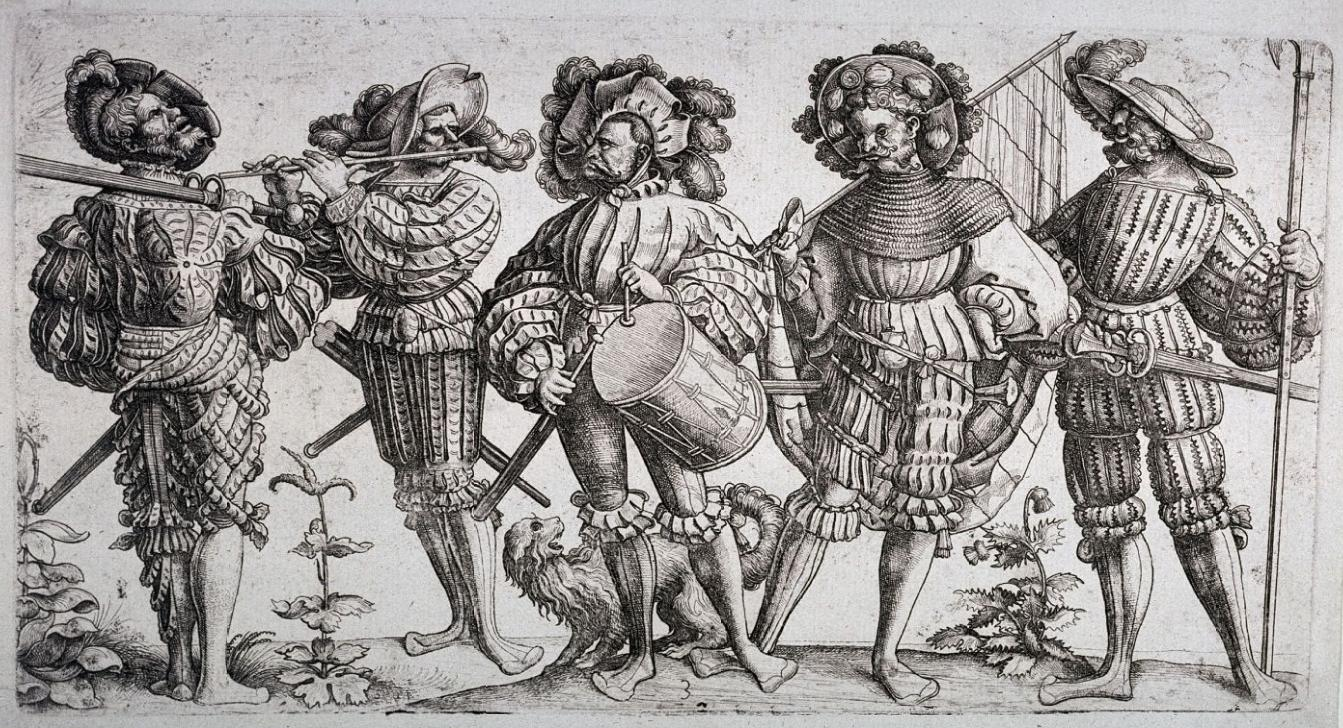 “Die fünf Landsknechte“, Radierung von Daniel Hopfer, um 1530